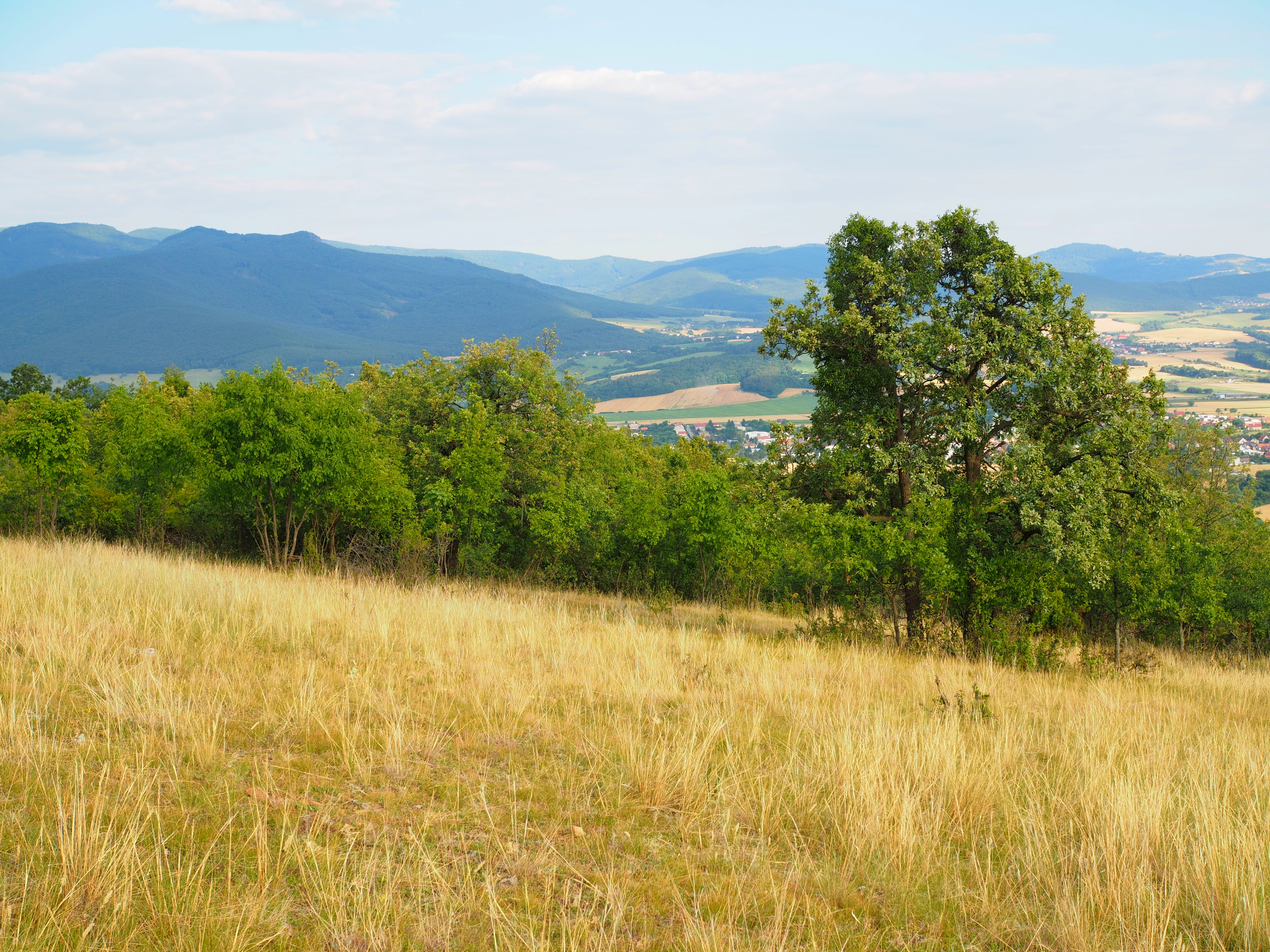 Přírodní rezervace Veľký vrch (Nature reserver Veľký vrch)